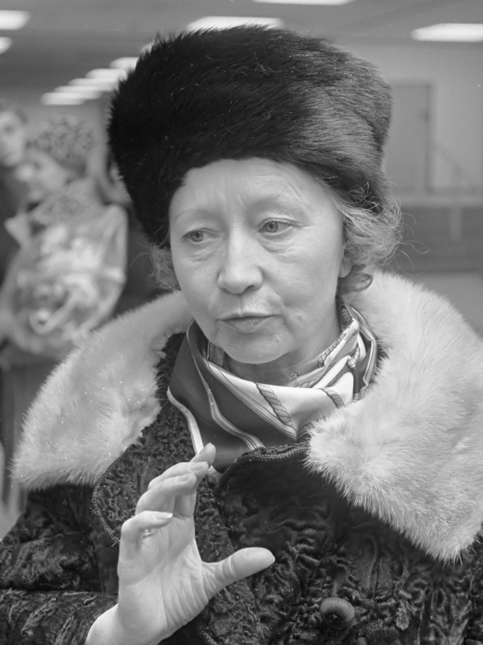 Aankomst Russisch topballet op Schiphol, Galina Ulanova artistiek leidster ballet 5 februari 1968